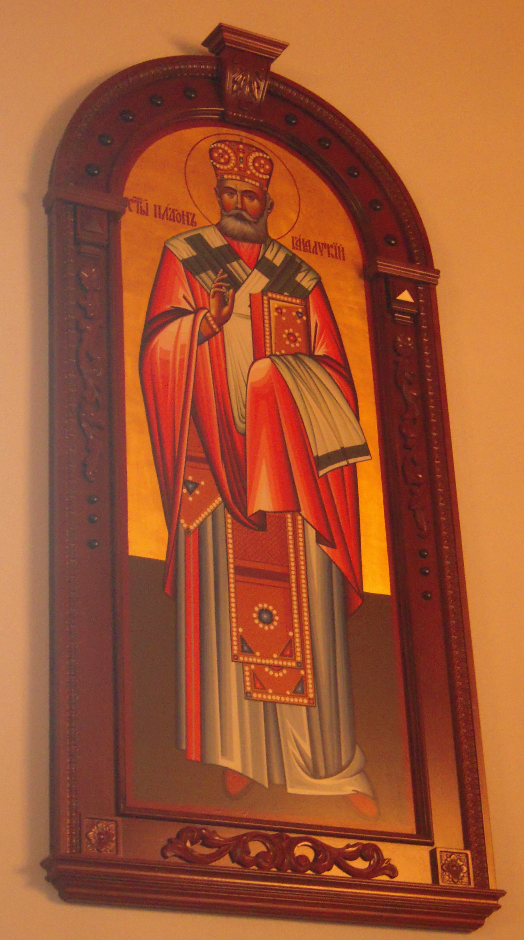 Platon Banjalučki